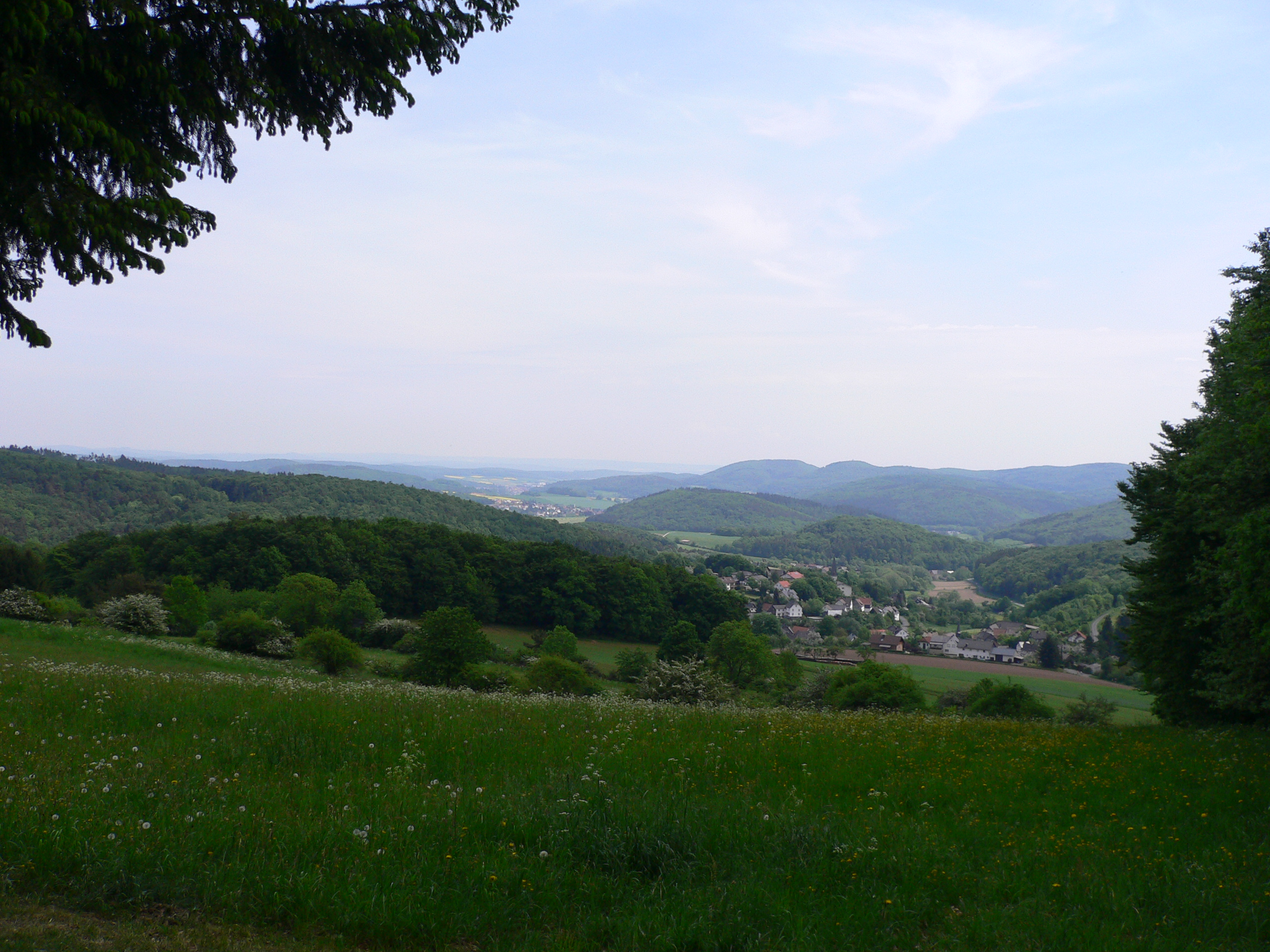 Blick ins mittlere Salzbödetal von der Schutzhütte "Am Stein", nordwestlich Wommelshausen